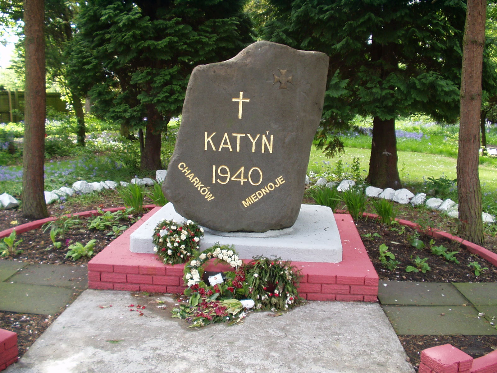 Drugi na wyspach po pomniku na cm.Gunnersburg w Londynie pomnik Ofiarom Katynia.Obelisk postawiony w parku przy owym domu sumptem kombatantów,przy życzliwej aprobacie władz miasta Kirkcaldy(czyli - a stawiajcie sobie).